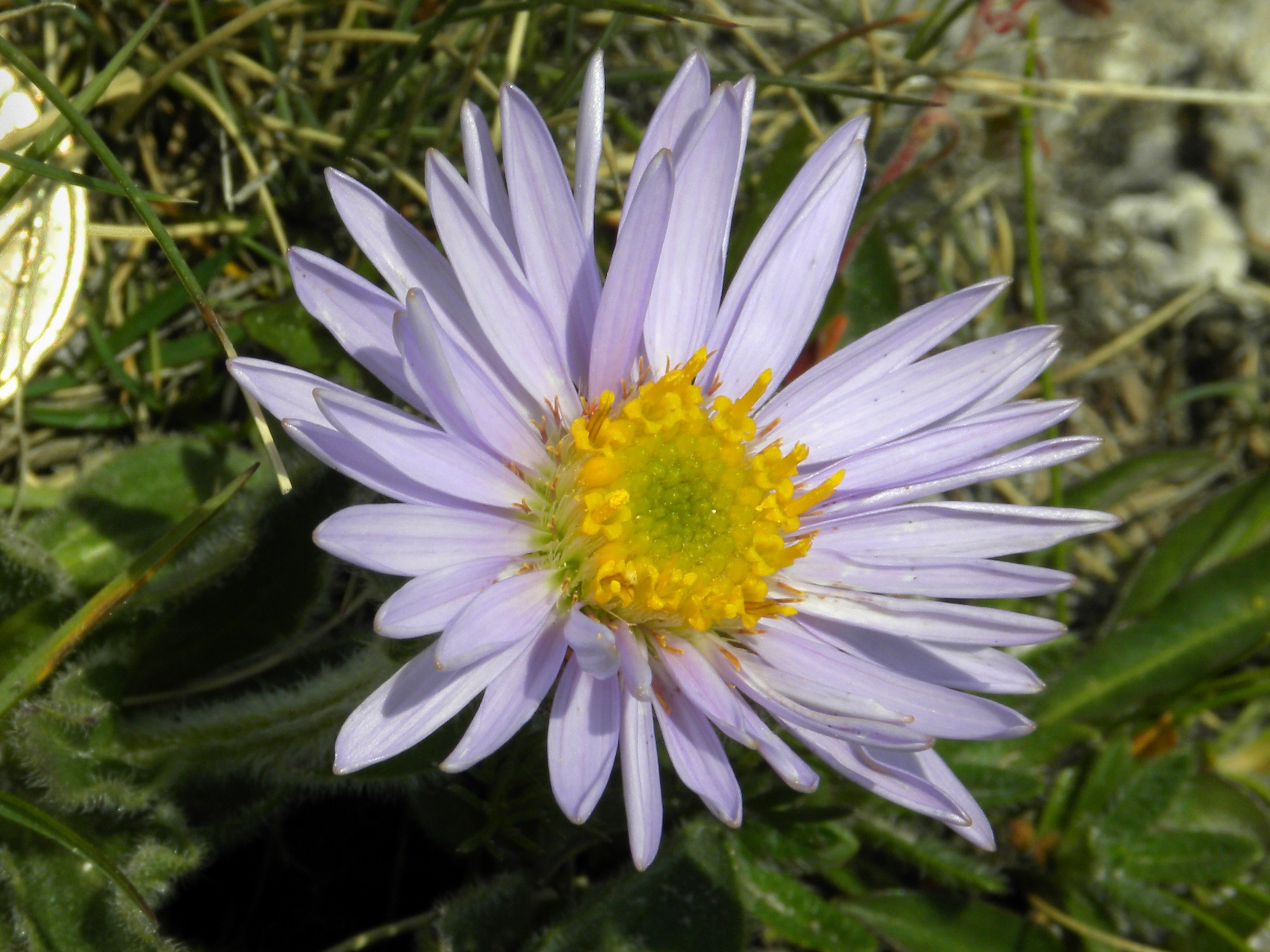 Alpenaster (Aster alpinus) auf der Rax